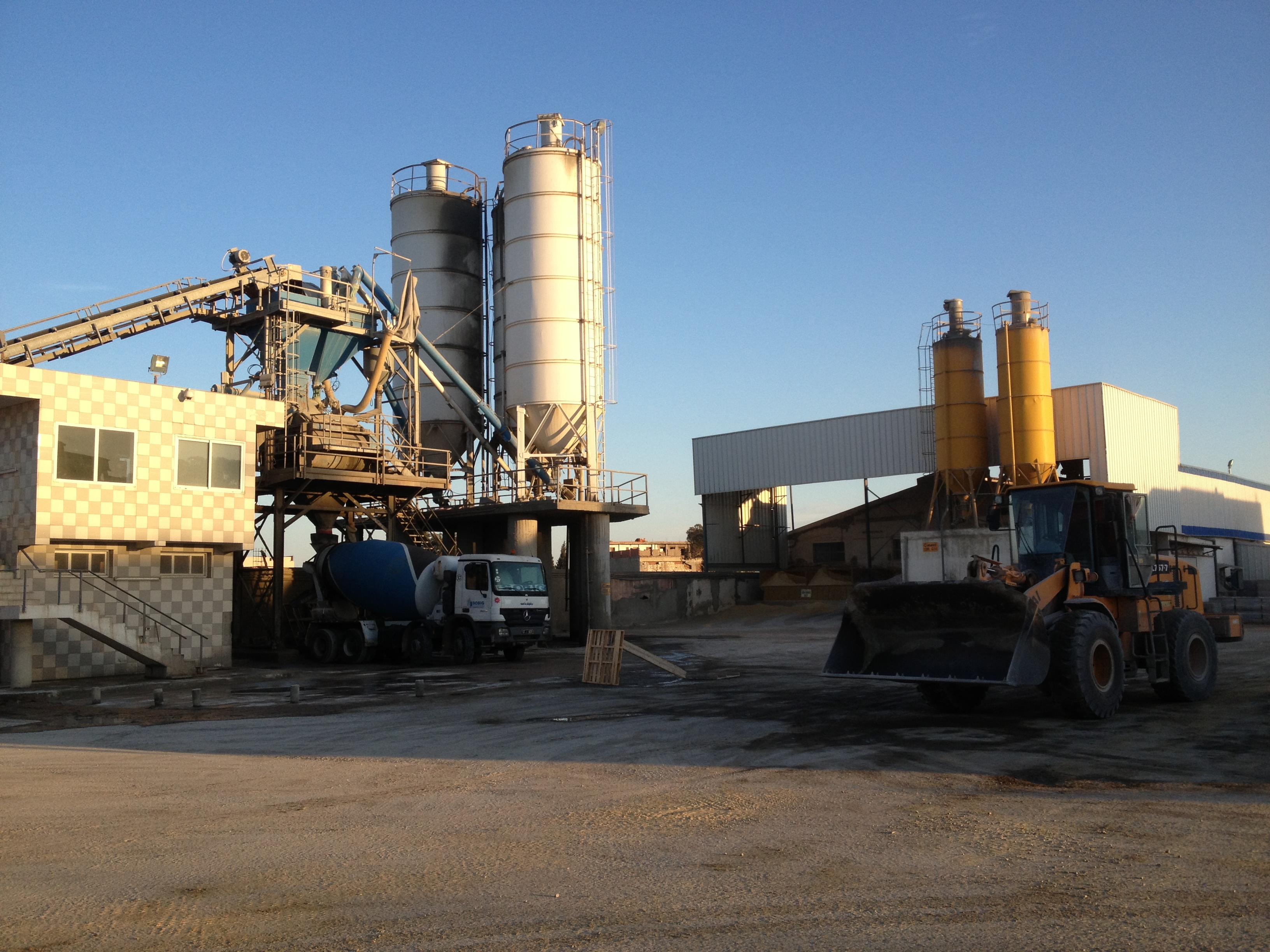 ENTREPRISE GLOULOU MOHAMED ET SALEM TUNISIA (M'SAKEN)